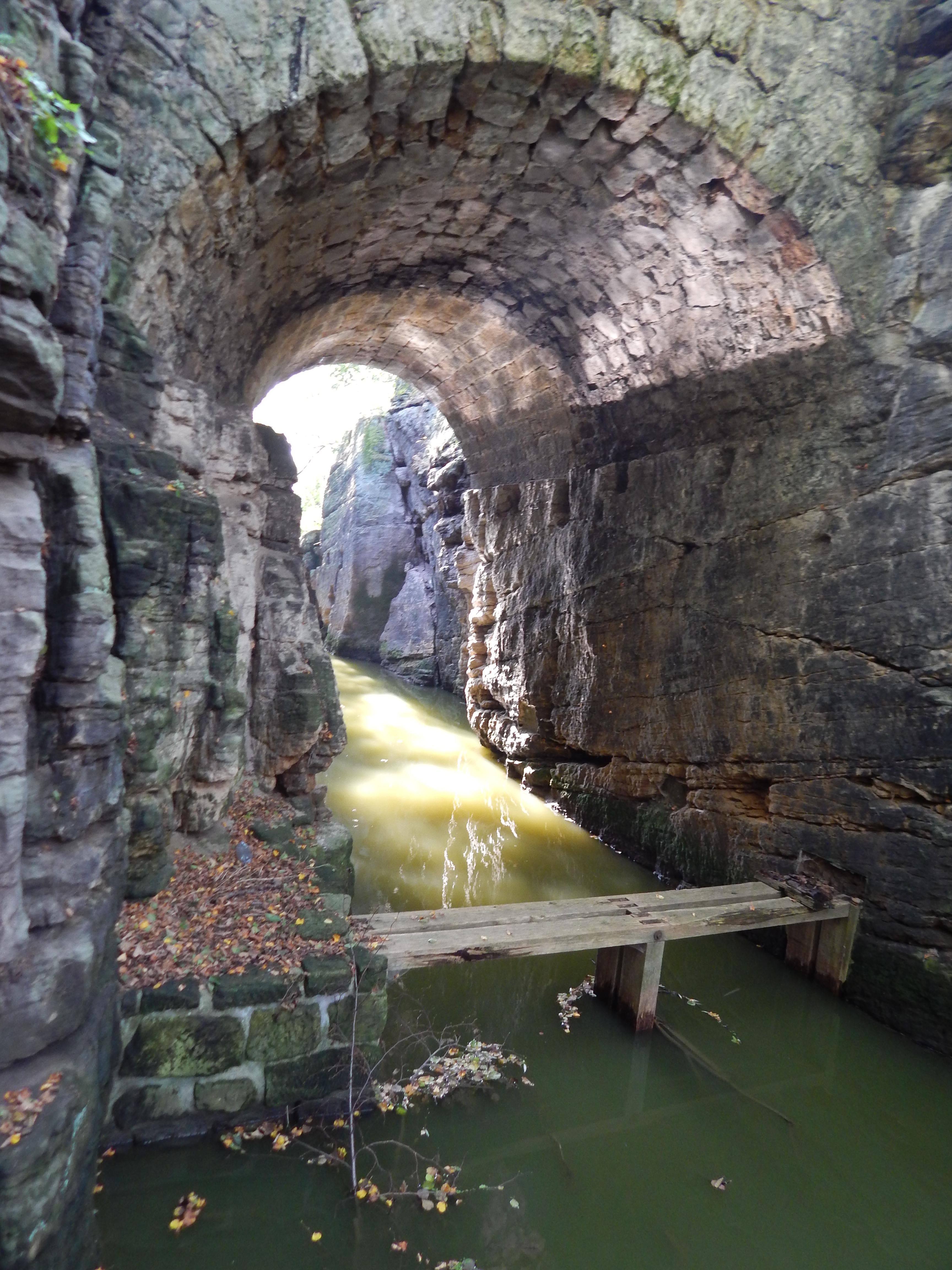 Novozámecký rybník, Zahrádky a Jestřebí, Zahrádky (okres Česká Lípa).